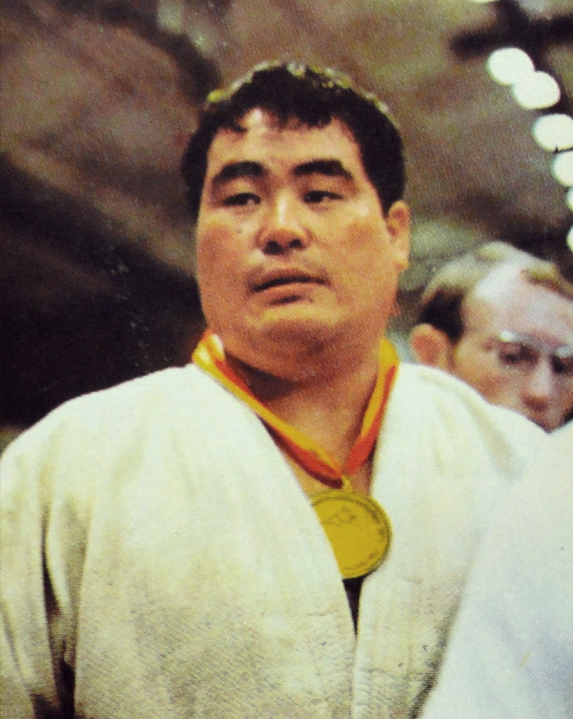 MUNCHEN 72-Figurina-Stickers-Panini-N° 62-SHINOMAKI recuperata